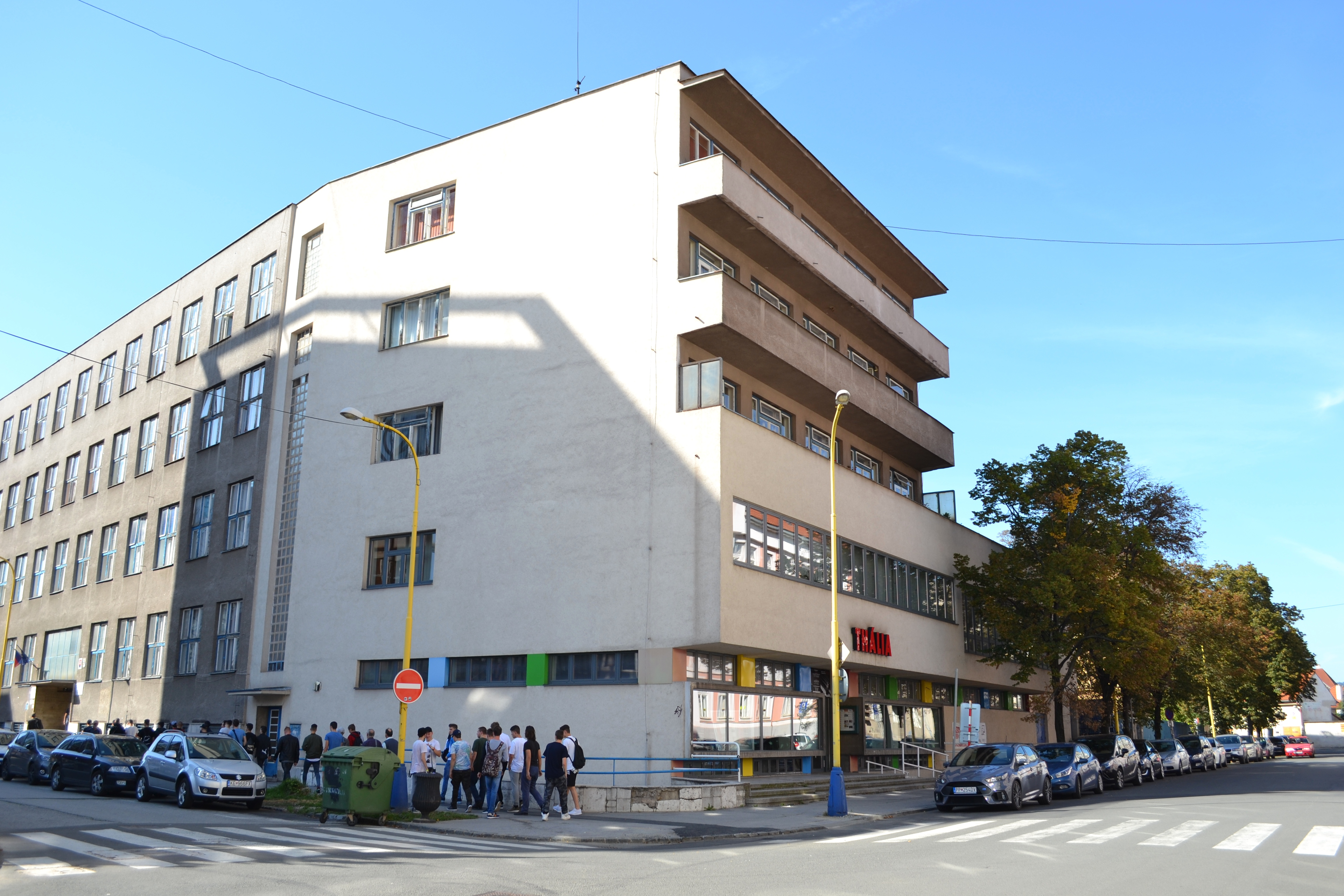 Pamätná budova (divadlo Thália) na Grešákovej ulici 1 v Košiciach